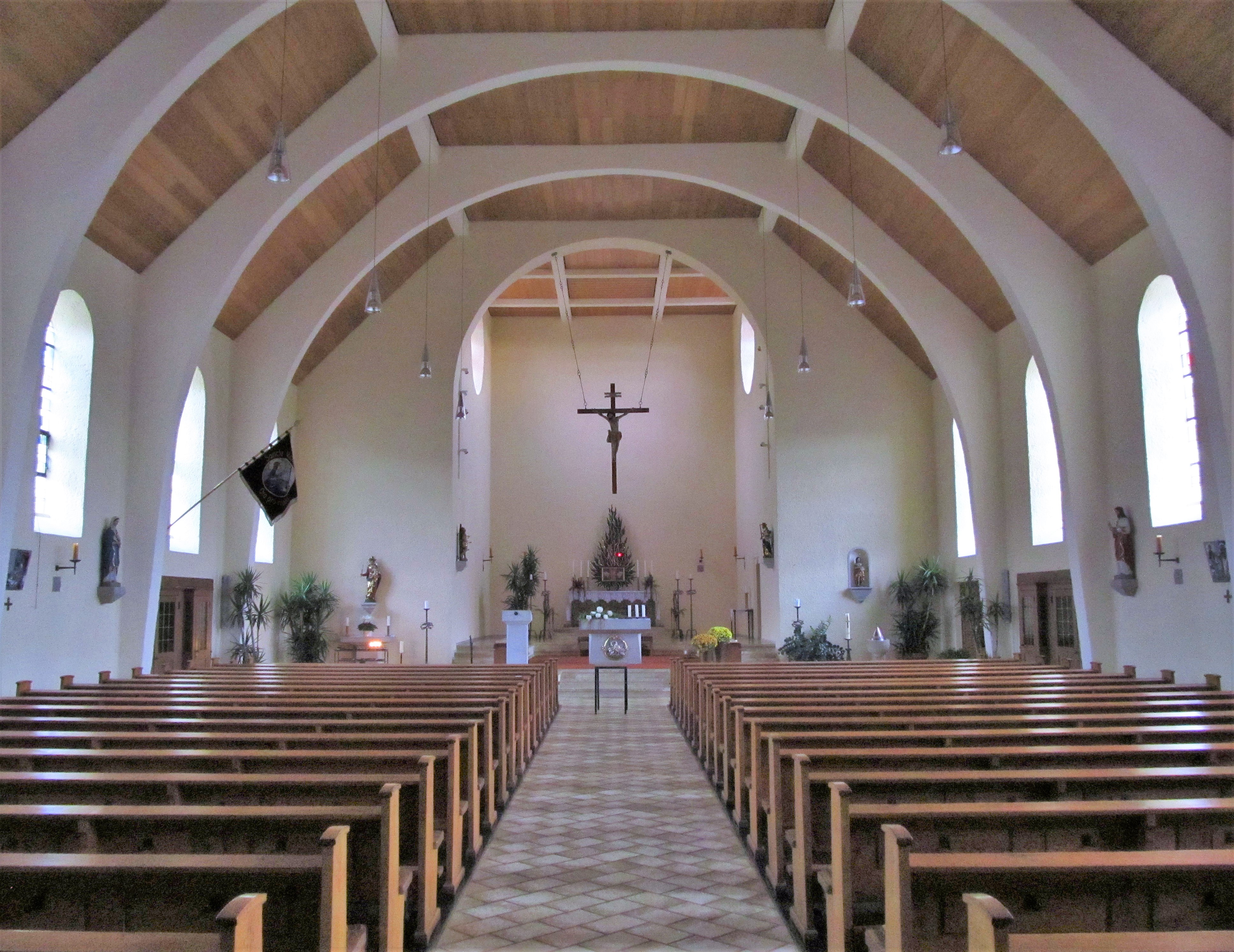 Blick ins Innere der katholischen Pfarrkirche St. Lukas in Bliesransbach, einem Ortsteil der Gemeinde Kleinblittersdorf, Saarland